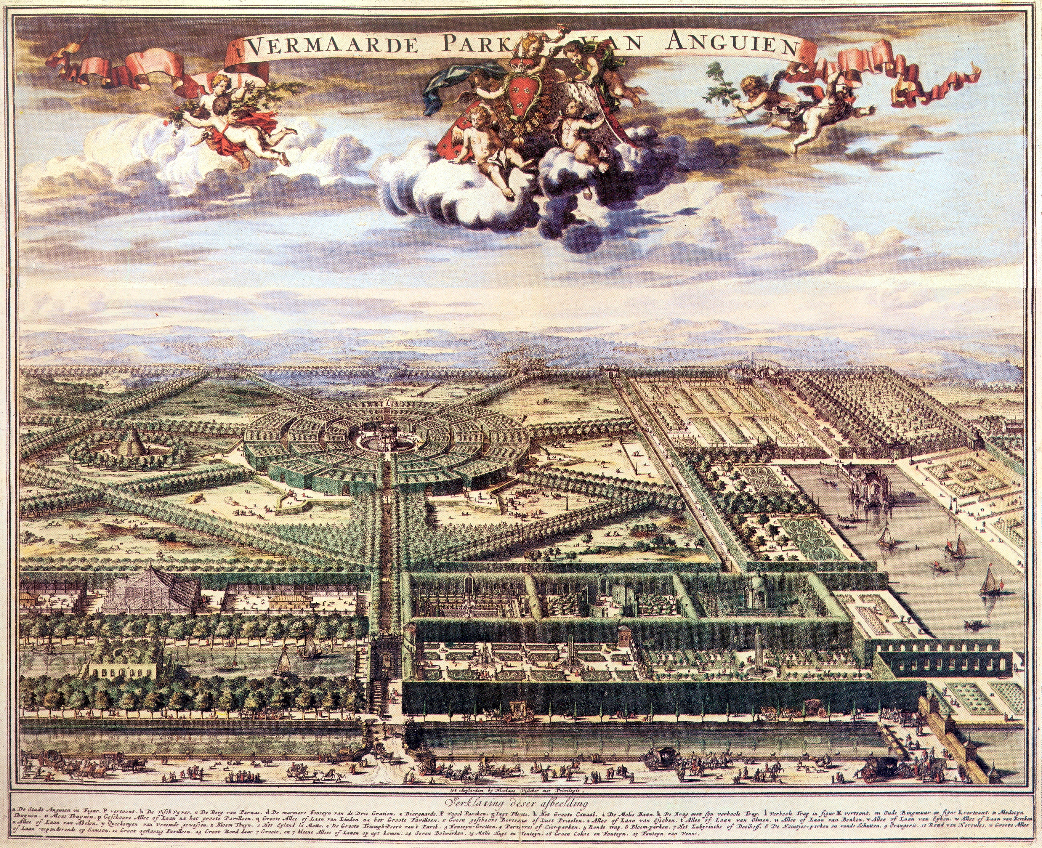 Colored engraving of the park of "'T Vermaarde Park van Anguien", or 'Reknowned Park of Enghien', south of Brussels 't Vermaarde Park van Anguien Verklaring deser afbeelding De stadt Anguien in figur P vertoont. b de Vischvyver, c De Berg van Parnas. d De marmeren Fonteyn van de Drie Gratien. e Dierguarde. F Vogel Parcken g Iagt Plaats h Het Groote Canaal. i De mailie Baan. k De Brug met syn verhoole Trap. l Verhoole Trap in fugur K vertoont. m Oude Ringmuur in figur L vertoont. n Medicyn Thuynen. o Moes Thuynen. p Geschoore Allee of Laan na het groote Pavilloen. q Groote Allee of Laan van Linden na het Groote Pavilloen. r Groen geschoore Berceaux of Lust Prieelen. s Allee of Laan van Eschen. t Allee of Laan van Olmen. u Allee of Laan van Beuken. v Allee of Laan van Eyken. w Allee of Laan van Bercken x Allee of Laan van Abelen. y Queekeryen van vreemde gewassen. z Bloem Thuyn 1 Het Eyland la Motte. 2 De Groote Triumph-Poort van 't Park. 3 Fonteyn-Grotten. 4 Parterres of Cier-parken. 5 Ronde trap. 6 Bloem-parken. 7 Het Labyrinthe of Doolhoff. 8 De Naintjes-parken en ronde Schatten. 9 Orangerie. 10 Rond van Hercules. 11 Groote Allee of Laan responderende op Samsom. 12 Groot agtkantig Pavilloen. 13 Groot Rond daar 7 Groote, en 7 kleine Allees of Lanen op uyt komen. 14 Seven Bolwerken. 15 Malie Huys en Fonteyn. 16 Groen Colise en Fonteyn. 17 Fonteyn van Venus